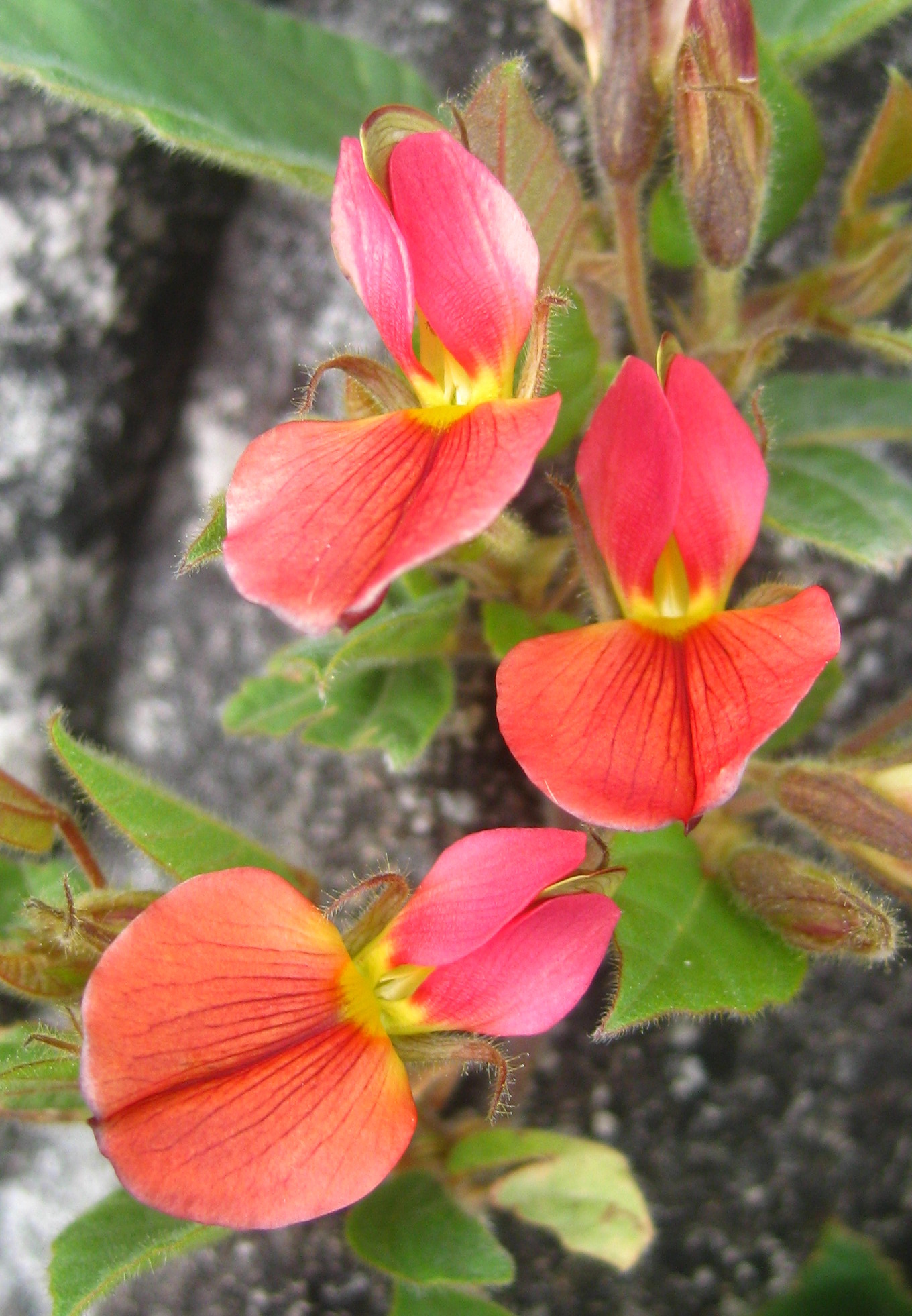 Fire pea or Rhynchosia monophylla (sub-family Papilionoideae) Tsetserra 2100 m.a.s. Mozambique.